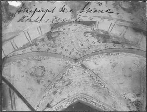 Kalkmålning i korvalvet. Efter renknackningen. Kategori: (03) KalkmålningarKalkmålning i korvalvet. Efter renknackningen.